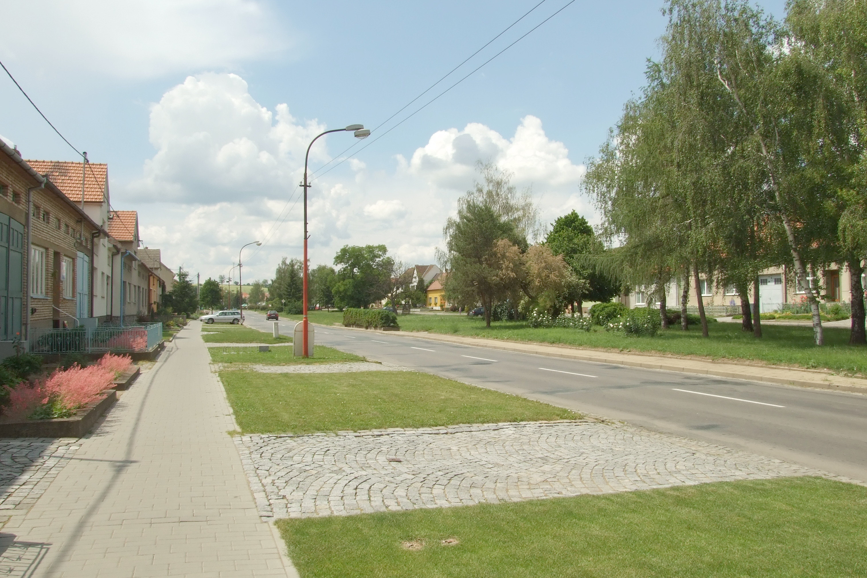 Hovorany - náves